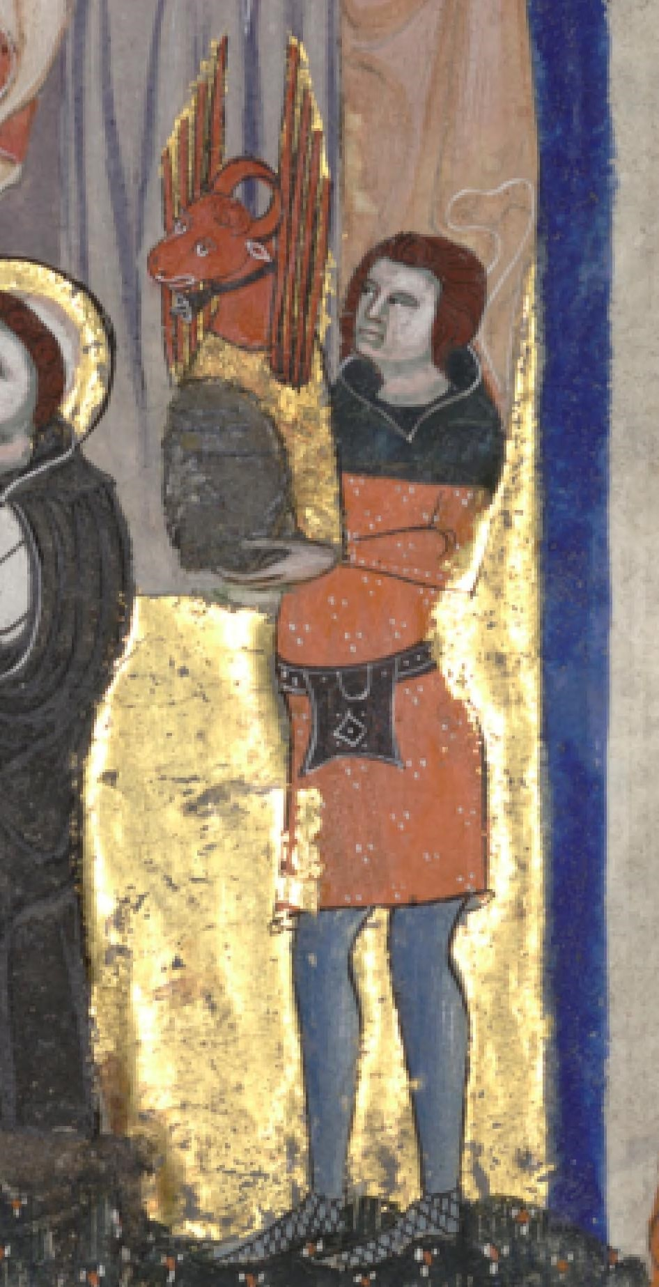 L'écuyer de Fébus tenant son heaume.